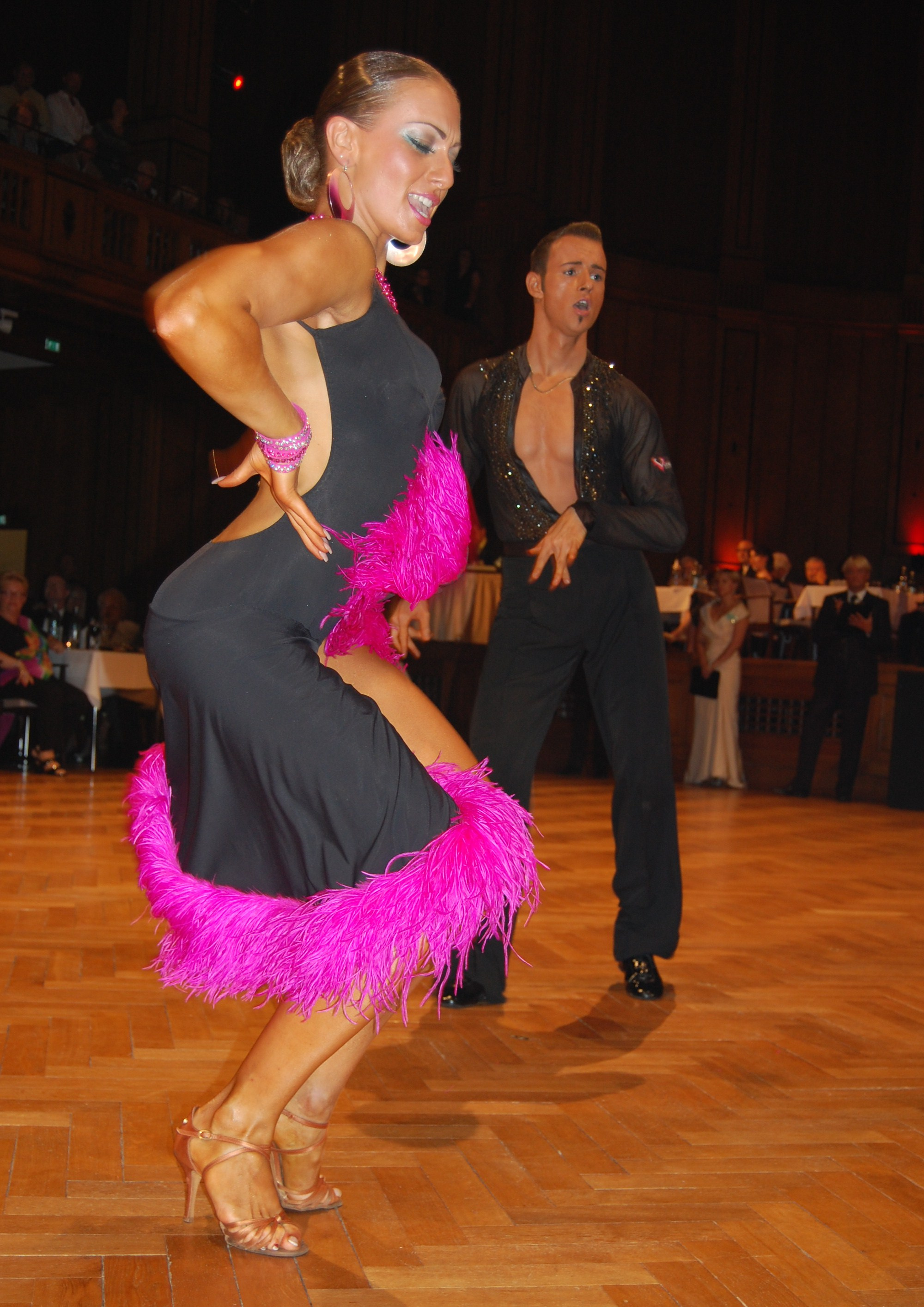 Amateurtanzsportler bei einem lateinamerikanischen Tanz